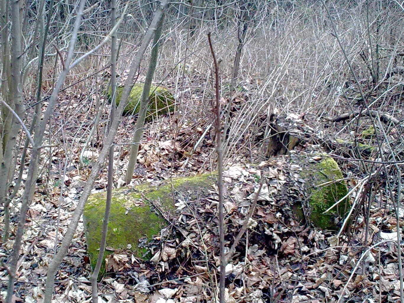 Kolumny z wieży na Górze Anny w Nowej Rudzie, leżące na stoku poniżej